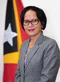 Maria Gorumali Barreto, Abgeordnete des Nationalparlaments Osttimors